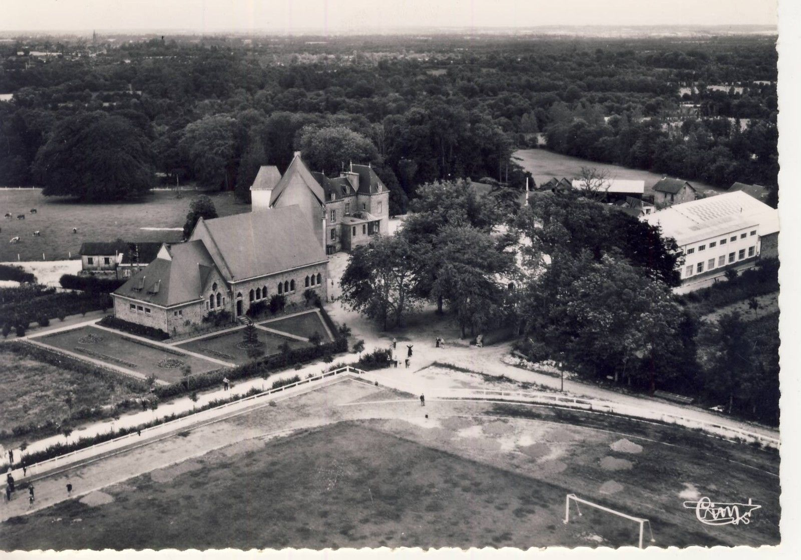 Château de Coat-an-Doc'h appartenant alors aux missionnaires salésiens. Carte postale des années 1940.